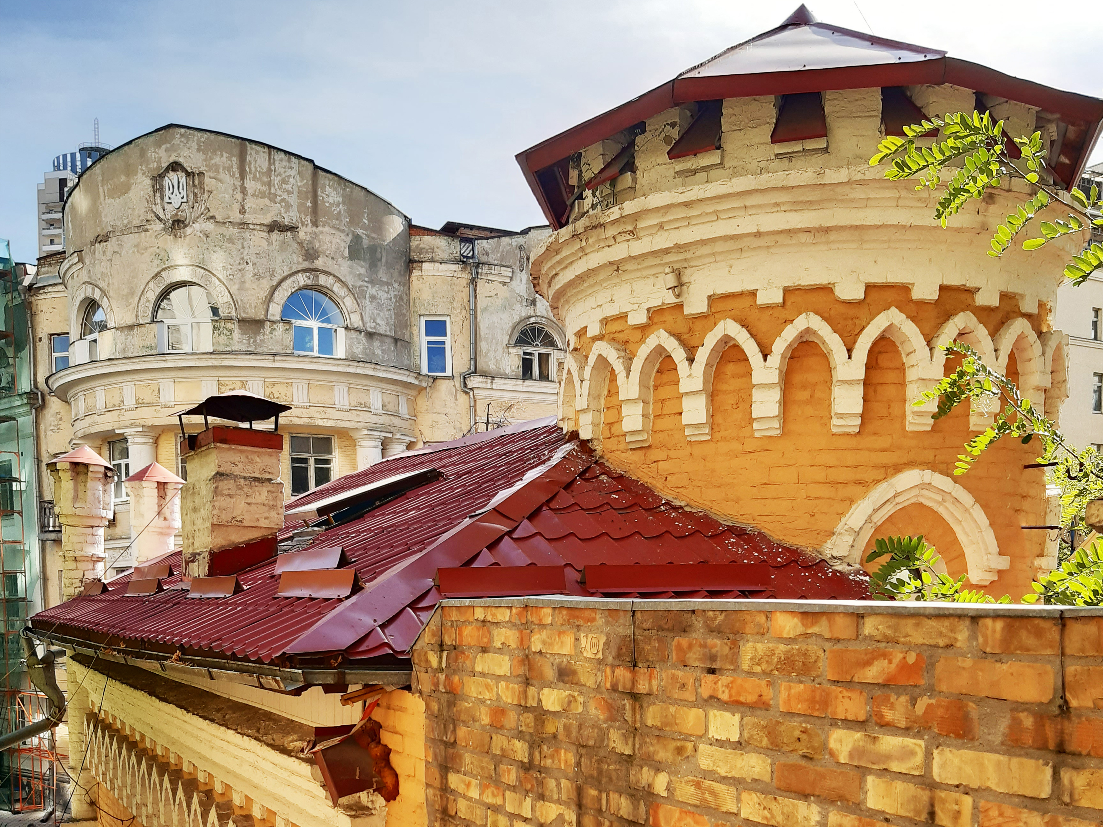 Садиба міська М. Лапинського, Київ, вул. О. Гончара, 60